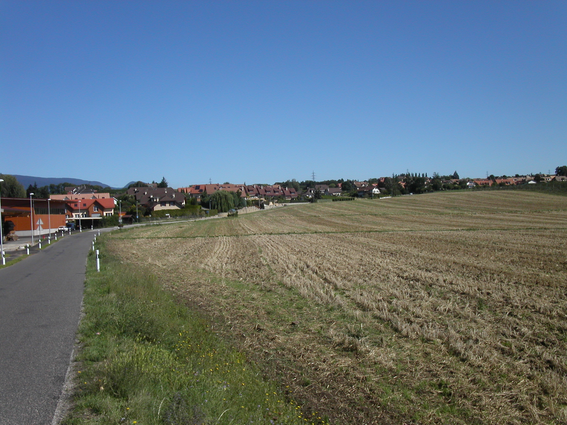 Etoy, entrée sud-ouest du village